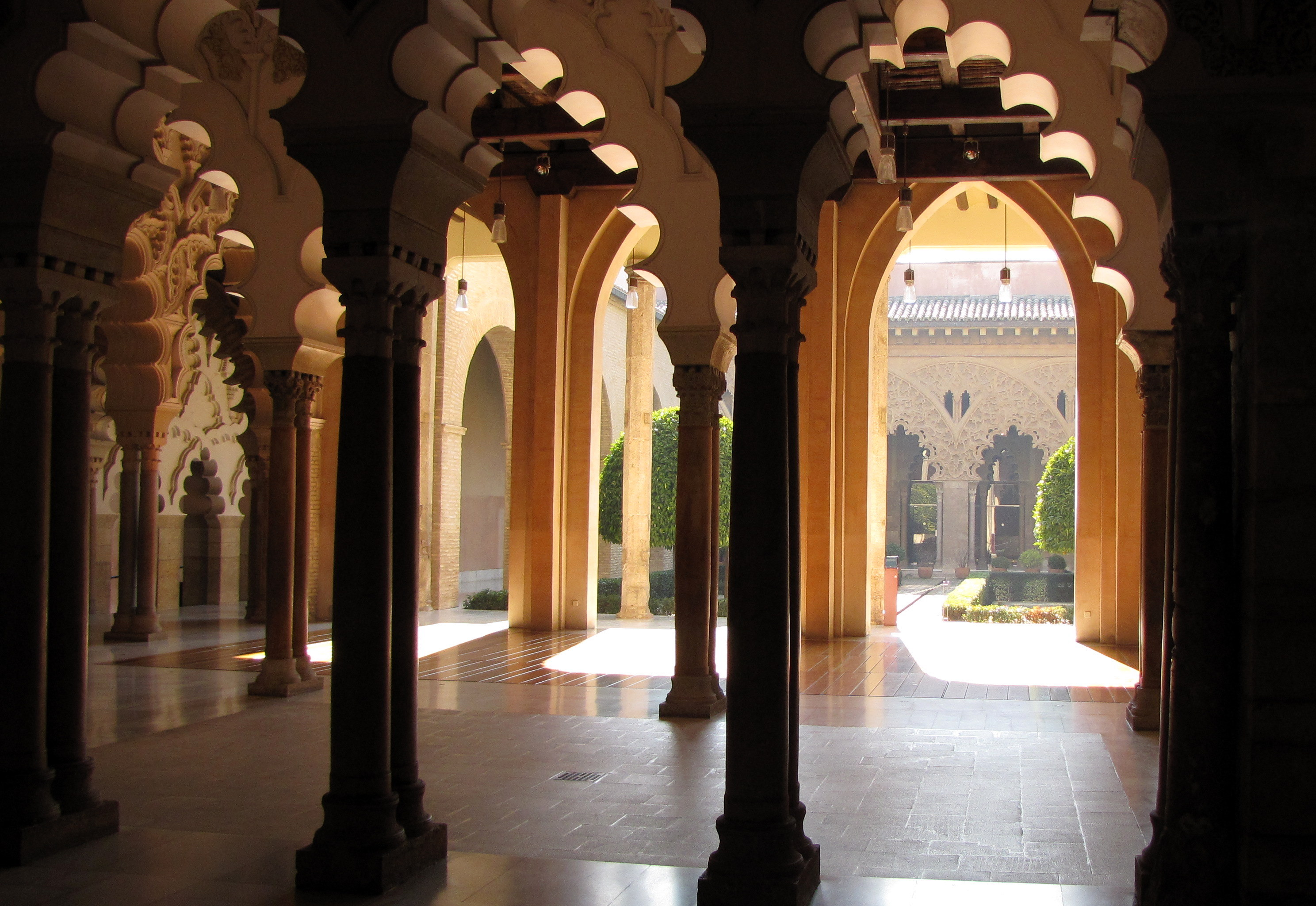 atmosfera Palacio de la Aljafería, Zaragoza